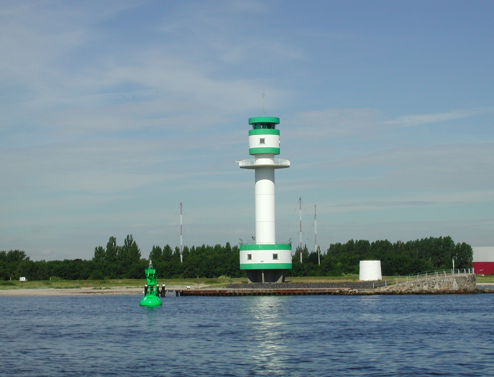 Leuchtturm Friedrichsort vor dem Falckensteiner Strand in Kiel-Friedrichort. Blickrichtung Westen.